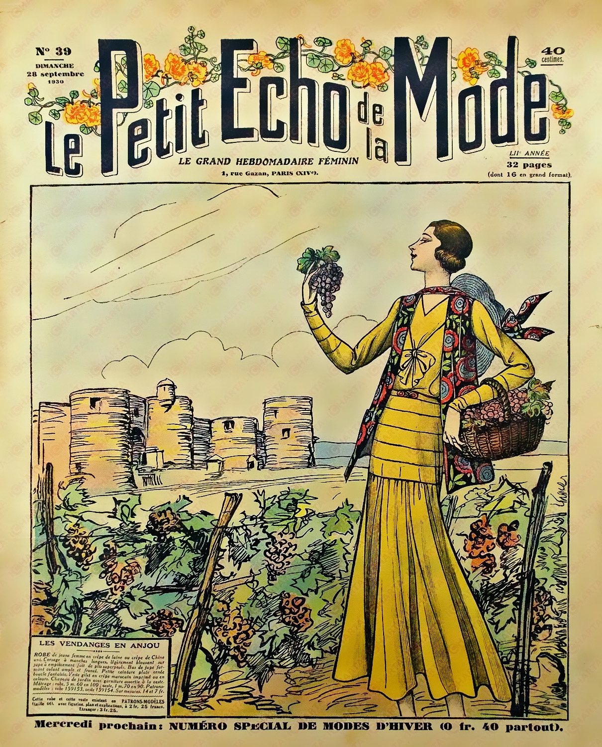 Vendanges en Anjou